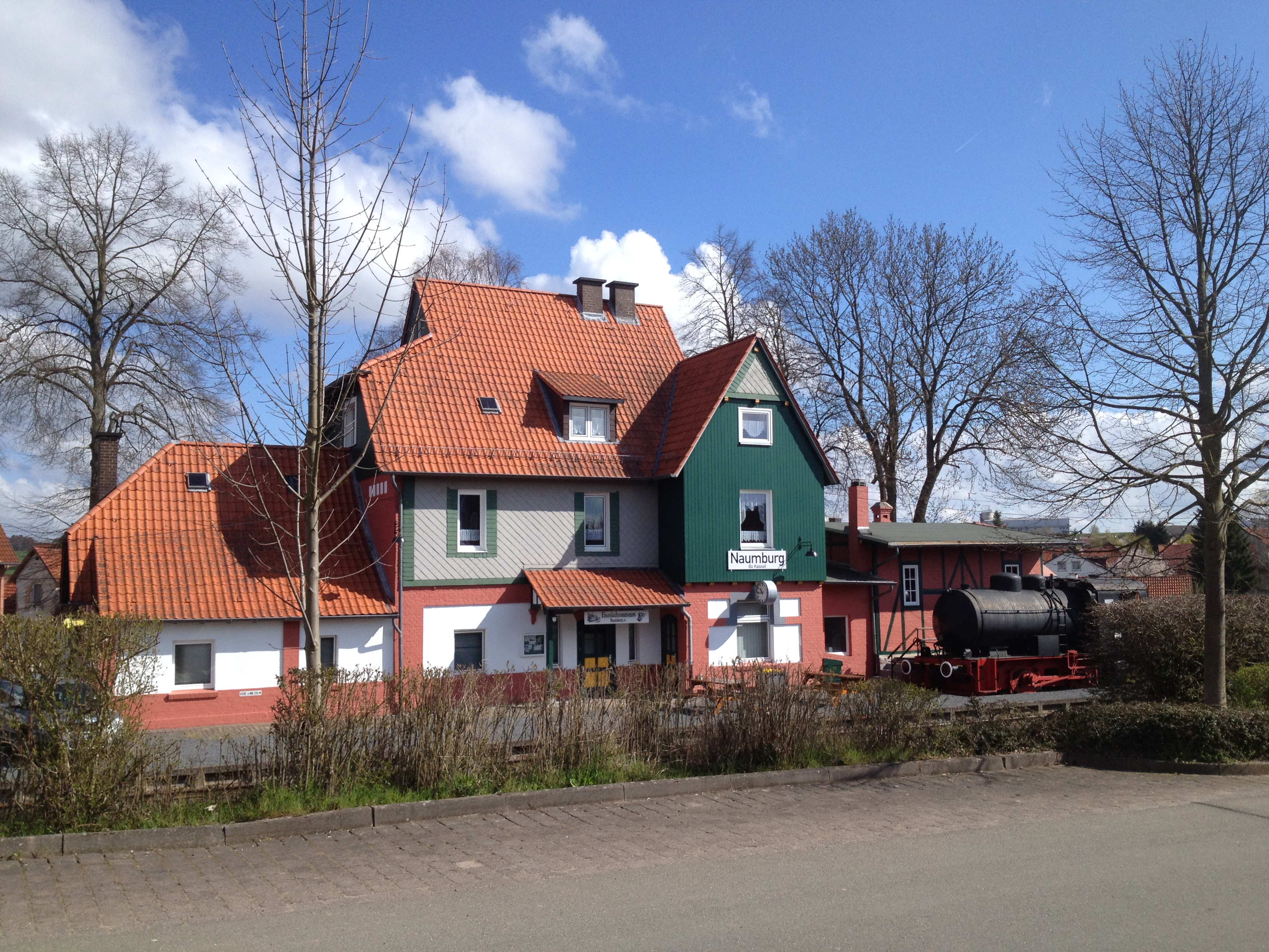 Der Bahnhof Naumburg (Hessen), Endbahnhof der Bahnstrecke Kassel-Naumburg (Hessencourrier)